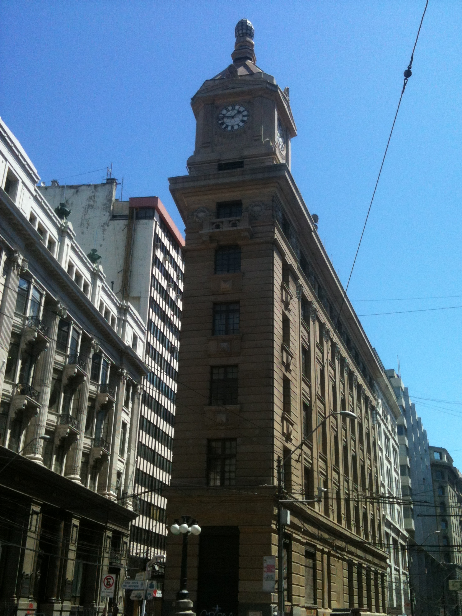 Edificio Agustín Edwards (Reloj Turri)